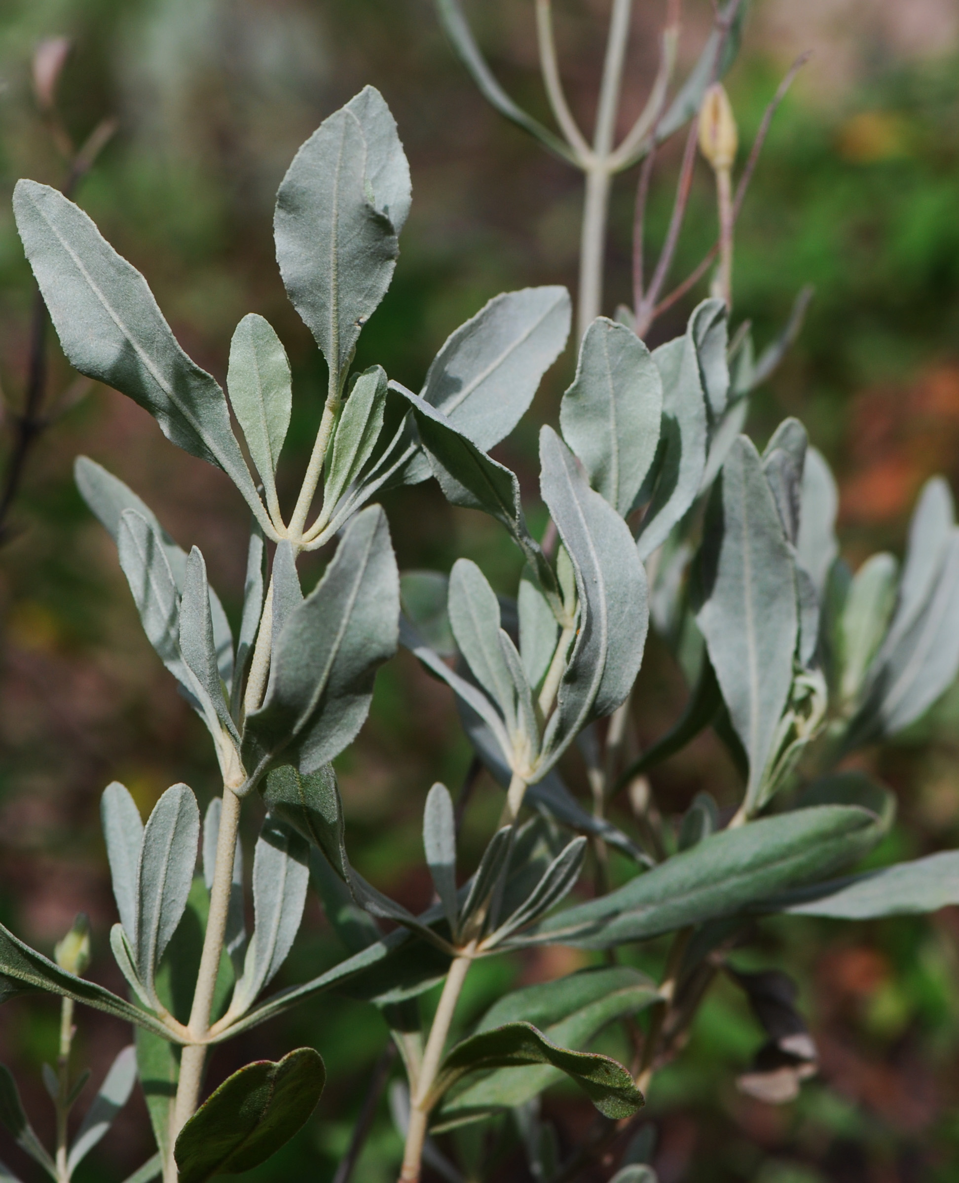 Feuilles d'Halimium halimifolium, hélianthème à feuilles d'arroche. Corse du sud